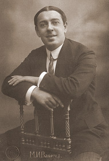 Михаил Вавич, один из популярнейших русских певцов (бас, баритон) начала ХХ века (оперетта и романс)